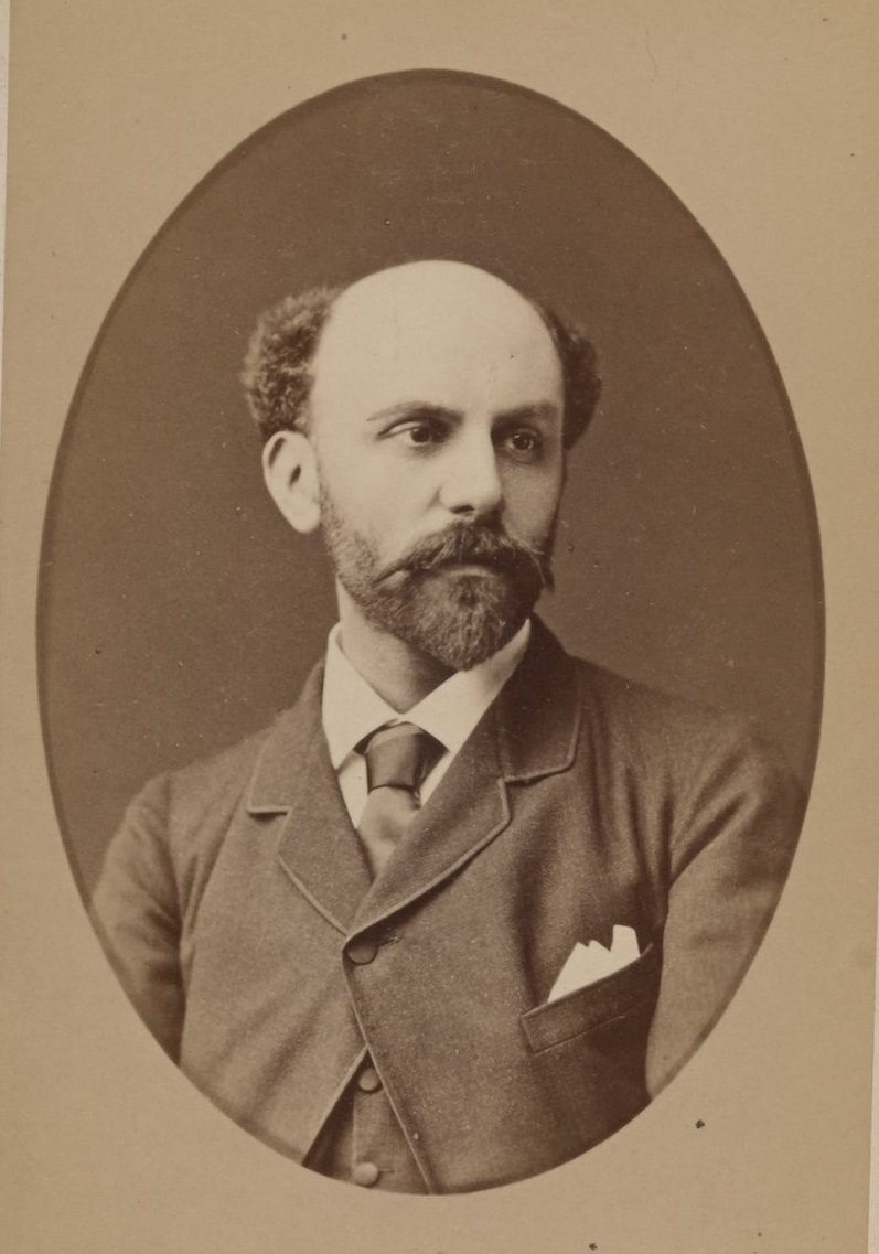 René de Saint-Marceaux